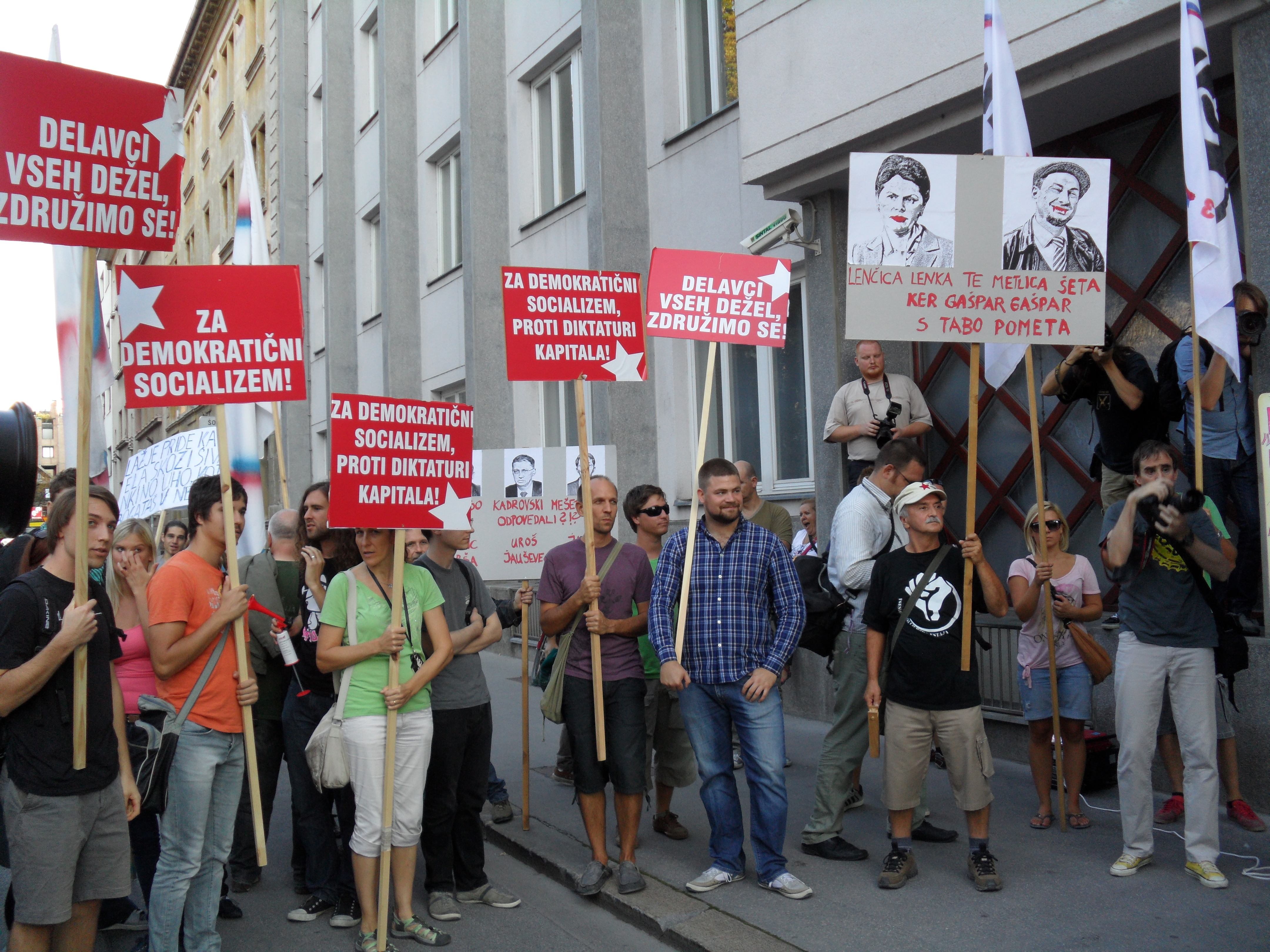 Shod proti vladi, koruptivnemu kadrovanju v državnih in občinskih podjetjih ter proti imenovanju Gašparja Gašparja Mišiča na čelo Luke Koper je pod sloganom "NE političnemu kadrovanju in NE tajkunsko-političnim-bančnim bandam" potekal v četrtek, 5. 9. 2013, tokrat po posredovanju Gregorja Viranta brez ograd in policijskih kordonov pred državnim zborom in vladnim poslopjem. Shod je pripravilo in podprlo devet vstajniških in civilnodružbenih gibanj. Protestniki so se s Trga republike podali na pohod čez Ljubljano. Sprehodili so se tudi mimo ameriškega veleposlaništva, kjer je bilo slišati vzklike proti vojaškemu posredovanju v Siriji. Protestniki so se nato ustavili pred vladnim poslopjem, kjer so mdr. spregovorili Julijana Zimic (gibanje VLV) ter Lara Valič in Matjaž Hanžek (stranka TRS). Med drugim so protestniki pred vladnim poslopjem zahtevali, da se sprejmejo ukrepi za omejevanje sistemske korupcije, ukinitev vseh brezpredmetnih svetov in komisij, omejitev interesnih skupin, kadrovanje po sposobnostih in znanju ter zakonsko podlago za vračanje v tranziciji protipravno pridobljenega premoženja. Po njihovem mnenju vlada Alenke Bratušek nima moči, da bi njihove zahteve uresničila, zato zahtevajo njen odstop in oblikovanje prehodne vlade, ki bo sposobna izvesti nujne ukrepe proti korupciji, klientelizmu in gospodarsko stabilizirala državo ter jo pripeljala do predčasnih državnozborskih volitev. Vodja VLV Uroš Lubej je za medije izjavil, da vstajniška gibanja načrtujejo novo, 6. vseslovensko vstajo v oktobru 2013.